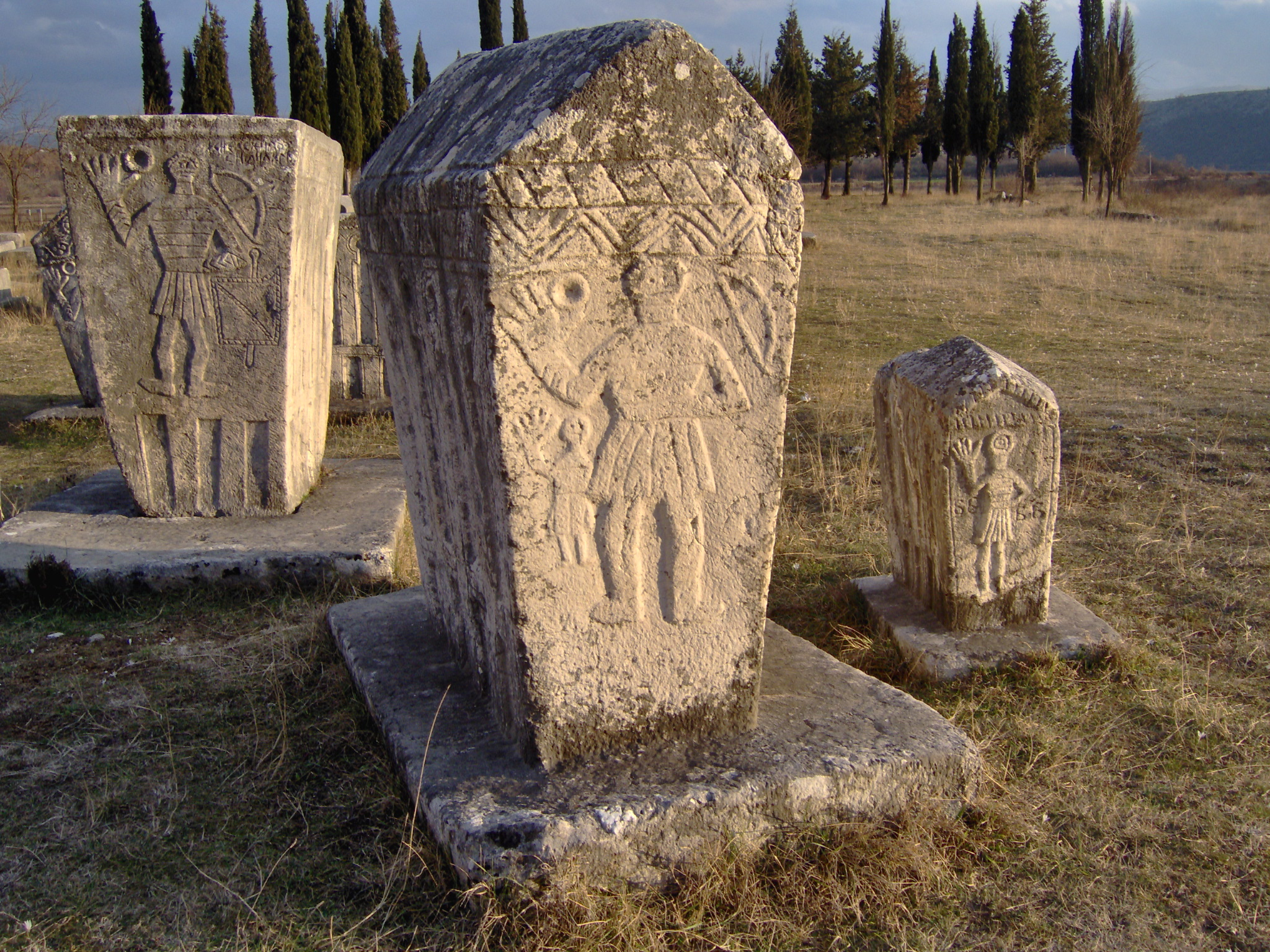 Stecci-gravar i Radimlja (i Hercegovina), bosniska-gravstenar